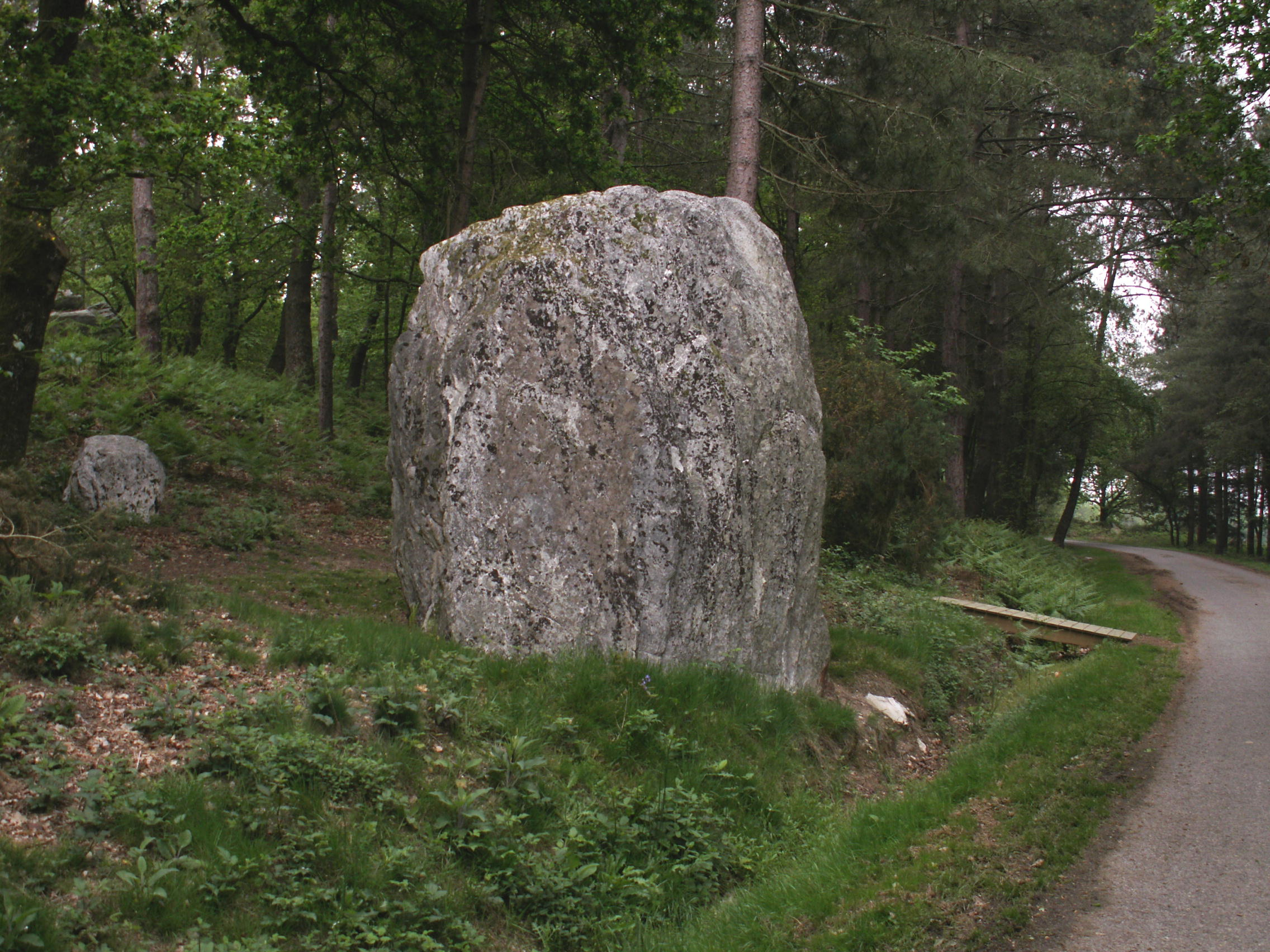 Fuseau de Berthe, (Classé, 1990) .